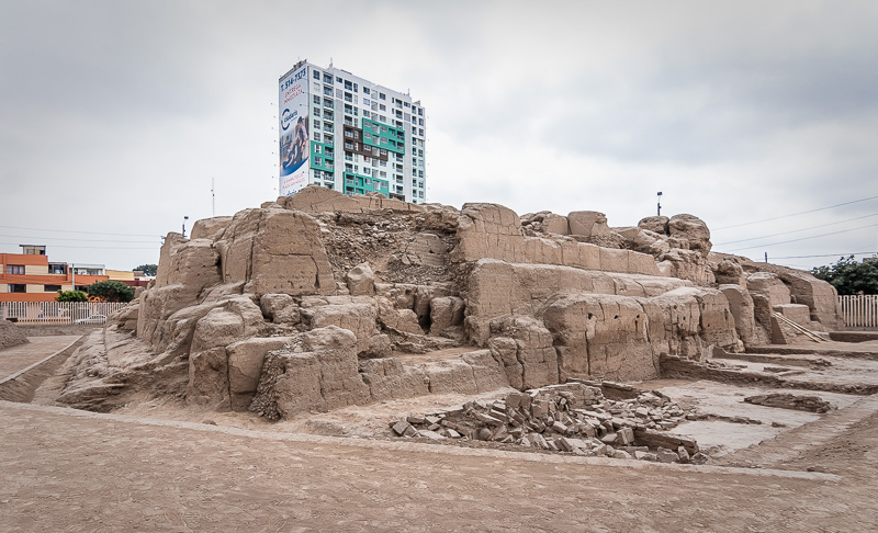 Pirámide E o pirámide funeraria menor del Complejo Arqueológico Mateo Salado en Lima, Perú.